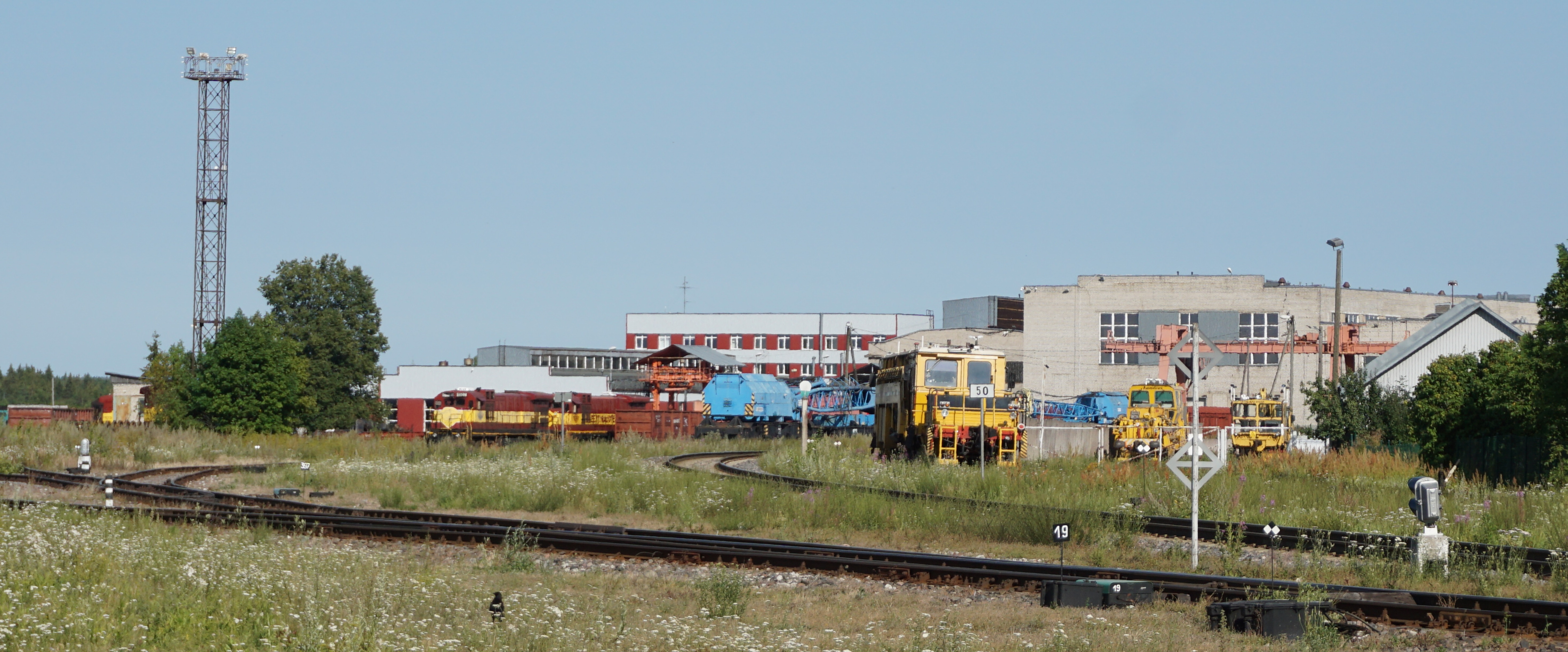 Vaade Tapa depoole